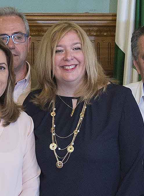 17.04.17 Visita a Motril 6